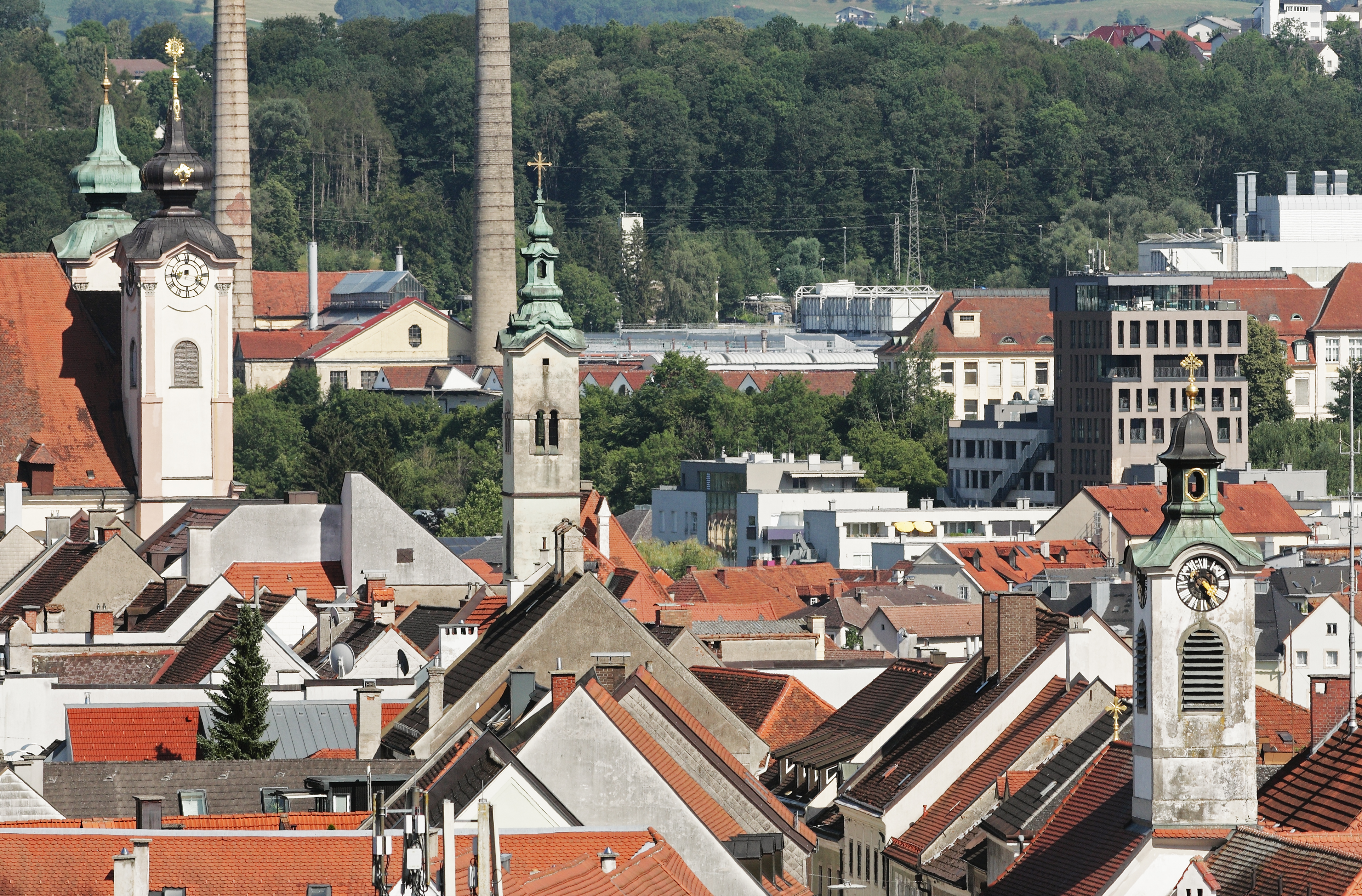 Steyr: Blick von der Seifentruhe auf Steyrdorf mit Ennsdorf im Hintergrund. Ansicht mit den Türmen der Michaelerkirche, der ehemaligen Bürgerspitalkirche und der Bruderhauskirche (von links nach rechts). Das Hochhaus hinter der Bruderhauskirche ist das Südpool-Bürohaus in Ennsdorf (Pachergasse). Aufnahme mit einem 200mm-Teleobjektiv